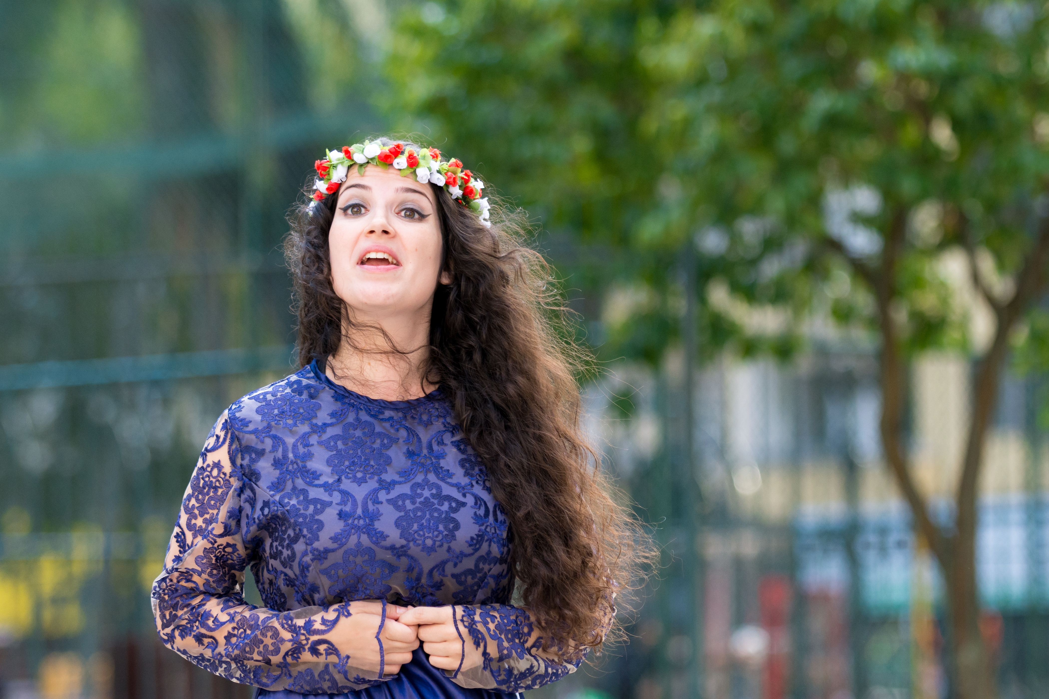 Trecho de "Romeu e Julieta" no espetáculo "O Mundo é um Palco" no 26º Festival de Curitiba. Atriz: Marcella Marin. Foto: Reinaldo Reginato.